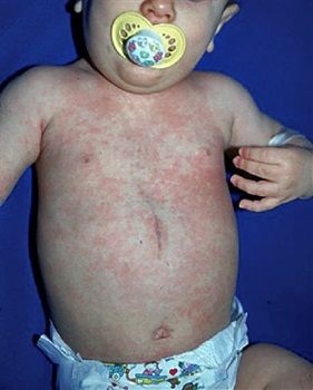 Joonis 1. Eksanteem.